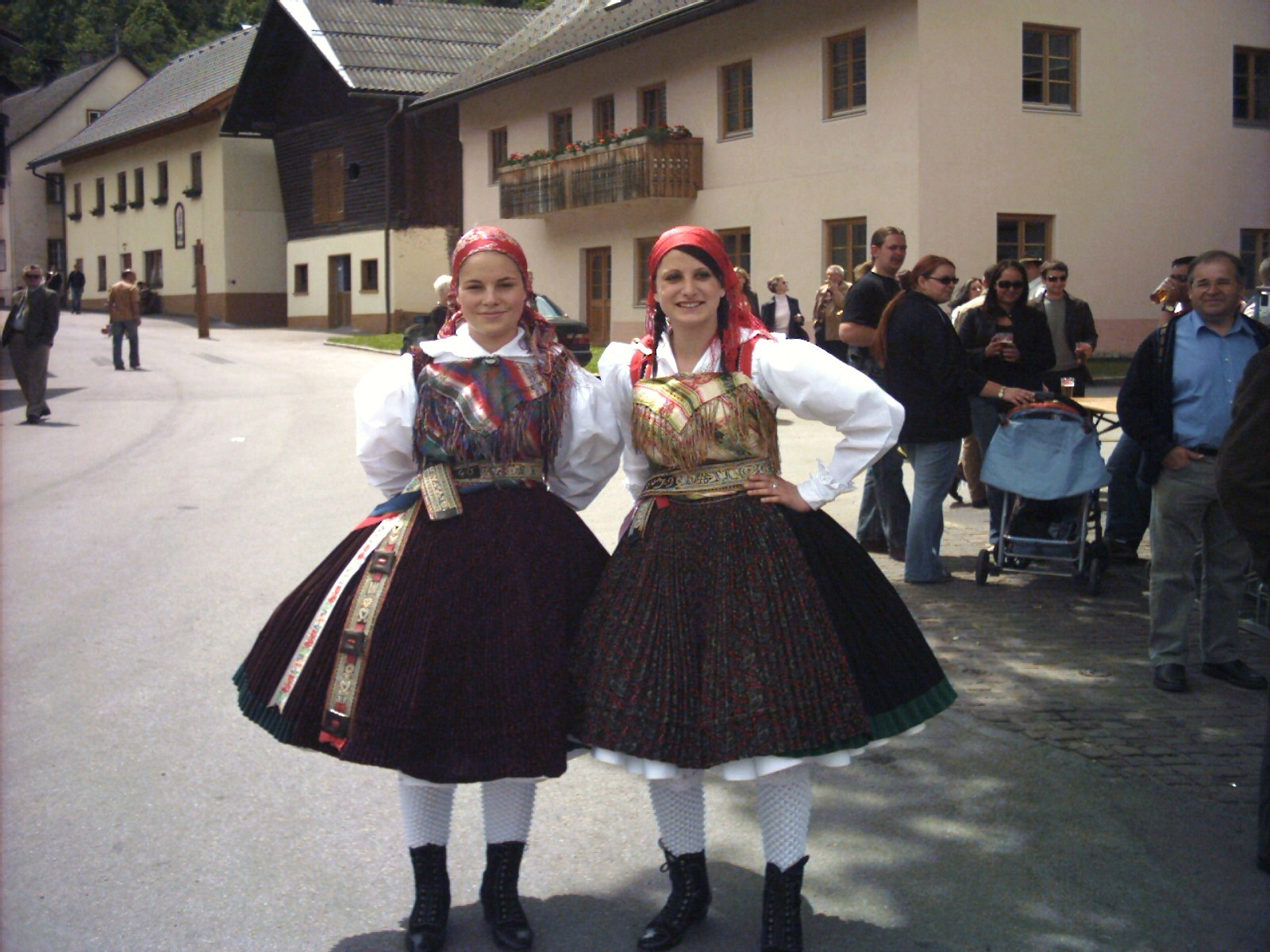 Gailtaler Frauentracht (Feistriz/Gail)